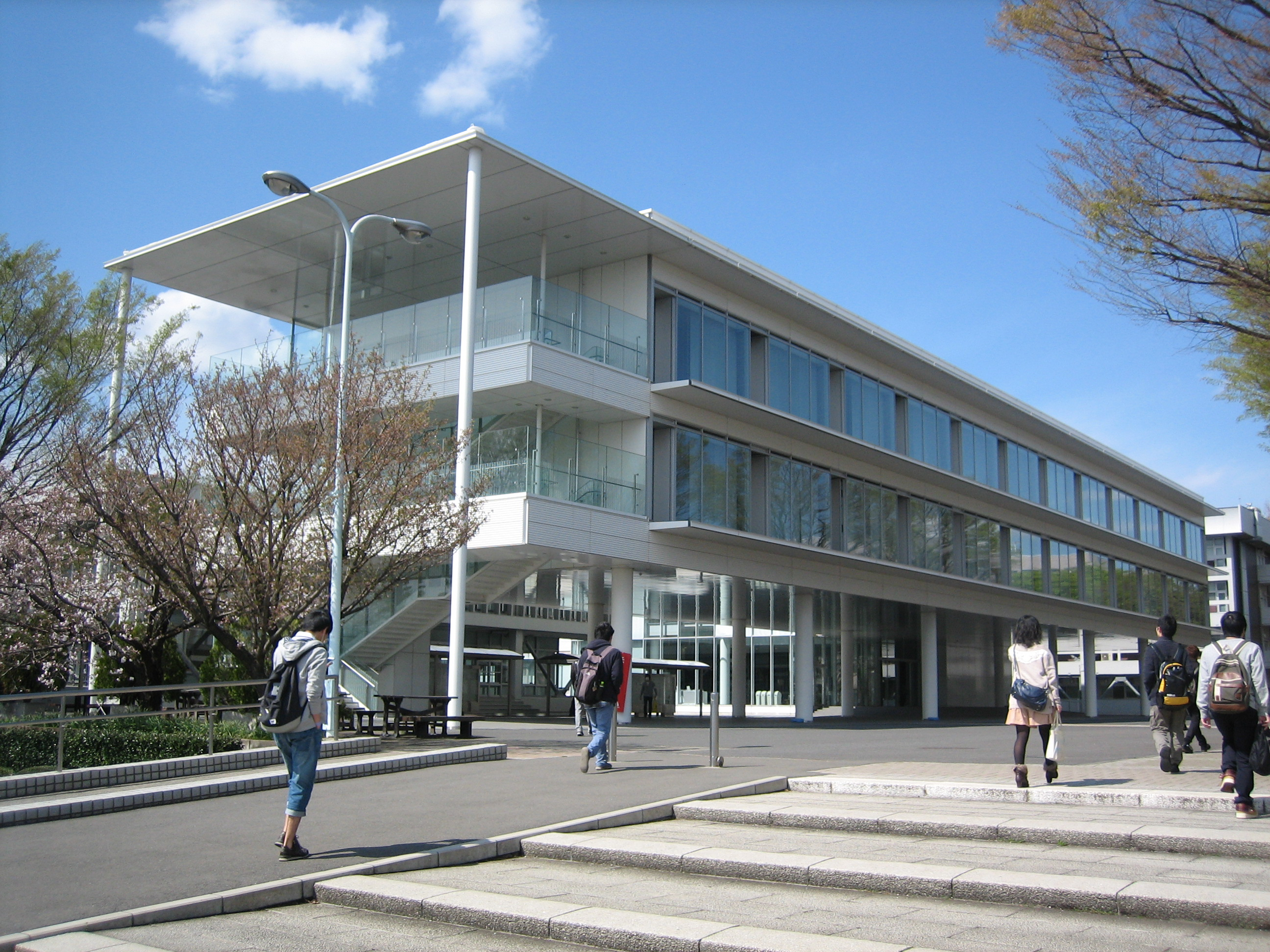 芝浦工業大学大宮キャンパス